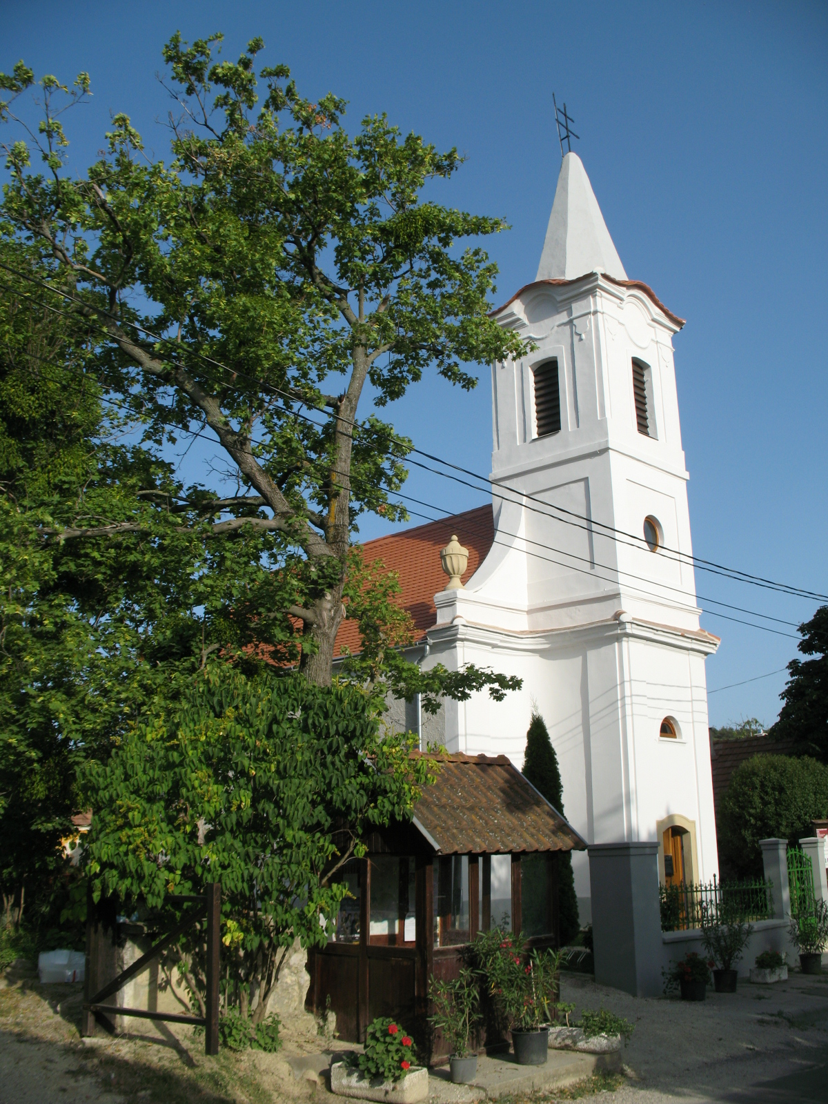 Óbudavár